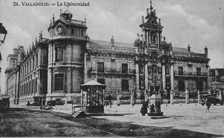 Universidad - Valladolid - Impresión: Heliotipia Artística Española - Madrid. Aún puede observarse en la parte izquierda la antigua fachada de la Universidad de la calle Librería y la antigua campana del reloj que anunciaba los Grados. - Tarjeta postal. Papel 140 x 88 B/N